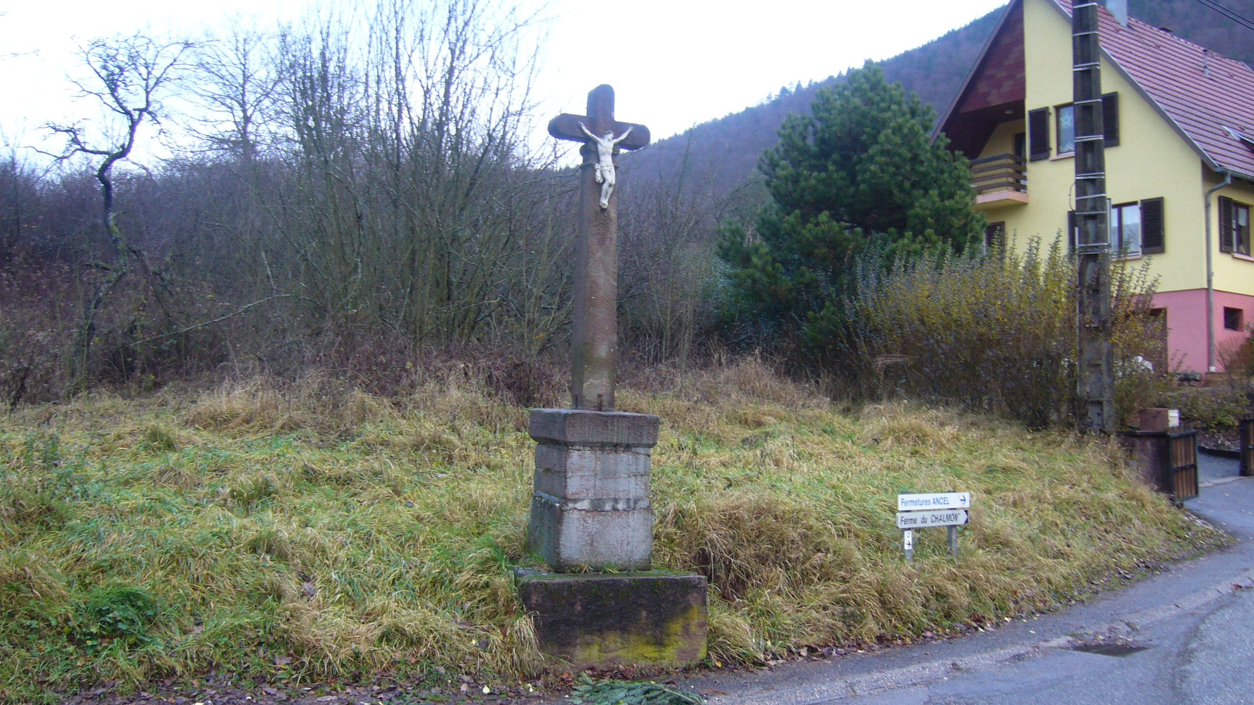 Croix de la Rochette, Lièpvre